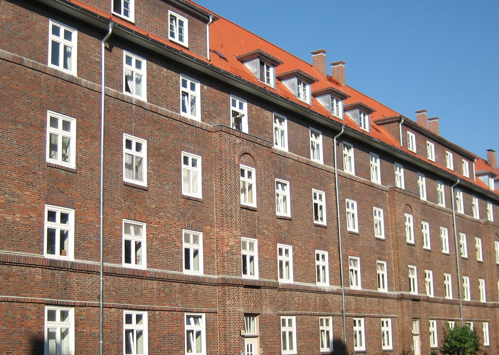 Außenfassade der Siedlung Dulsberg von Fritz Schumacher